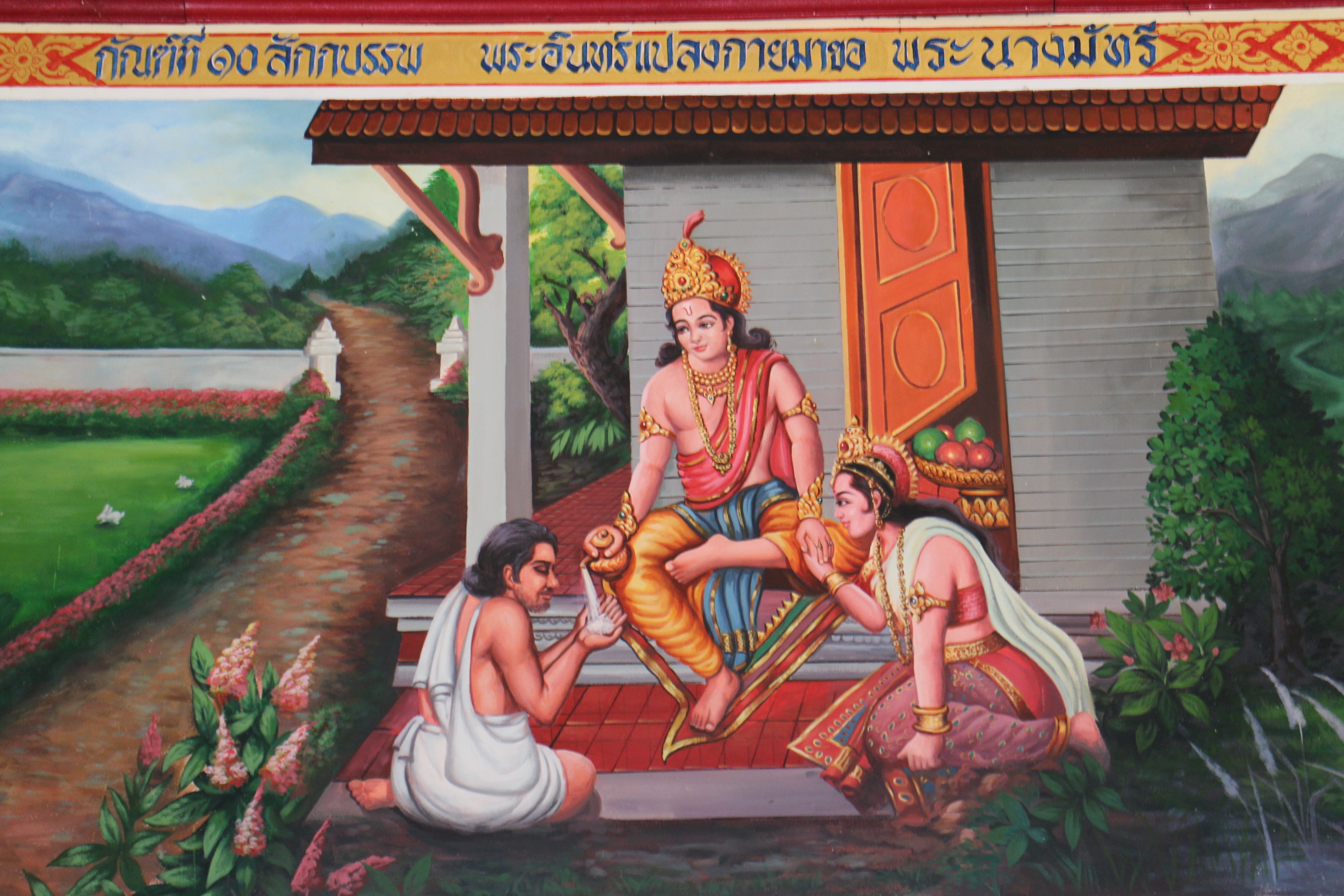 God Indra verhindert dat Vessantara zijn vrouw weggeeft.